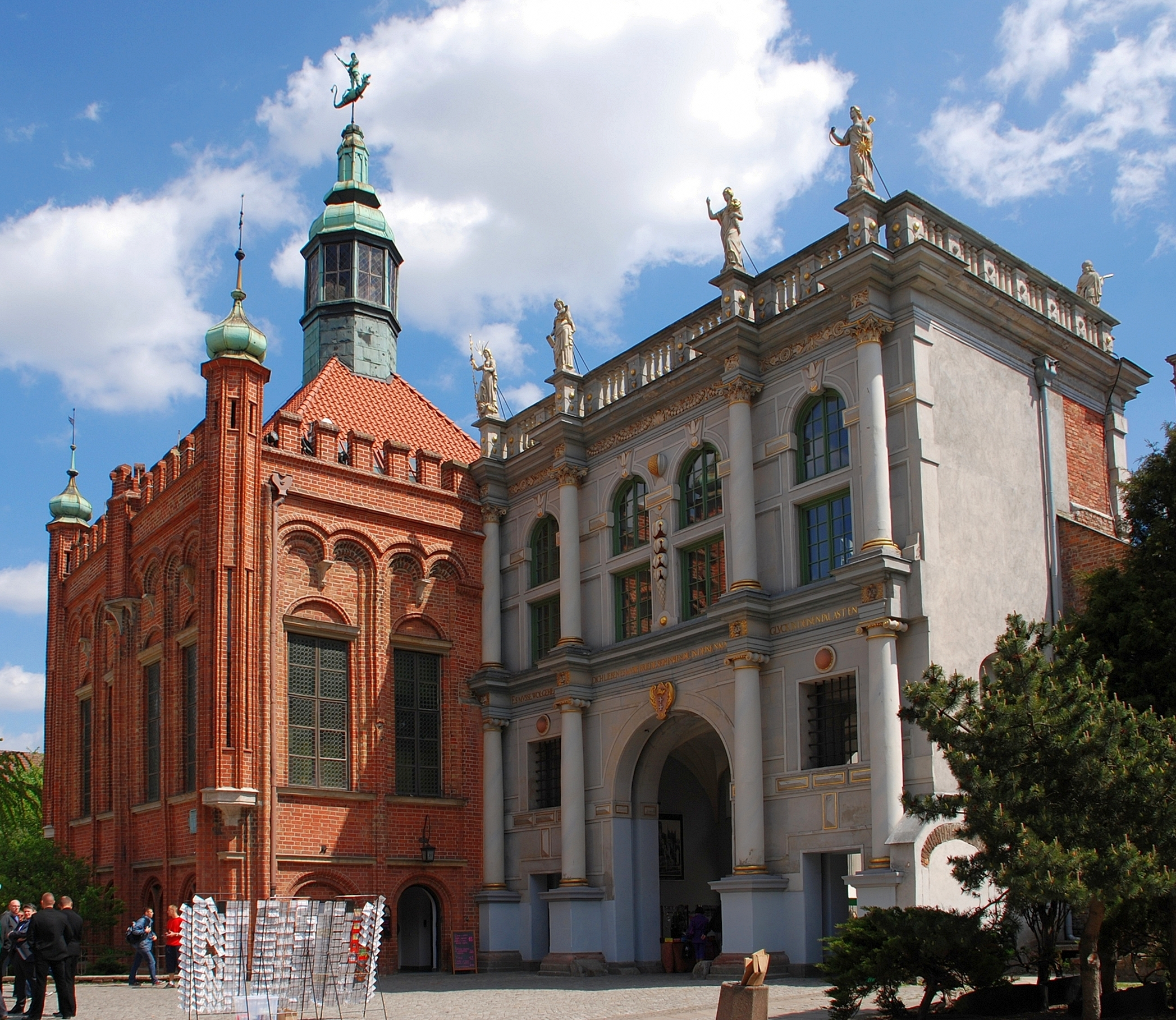 miasto Gdańsk